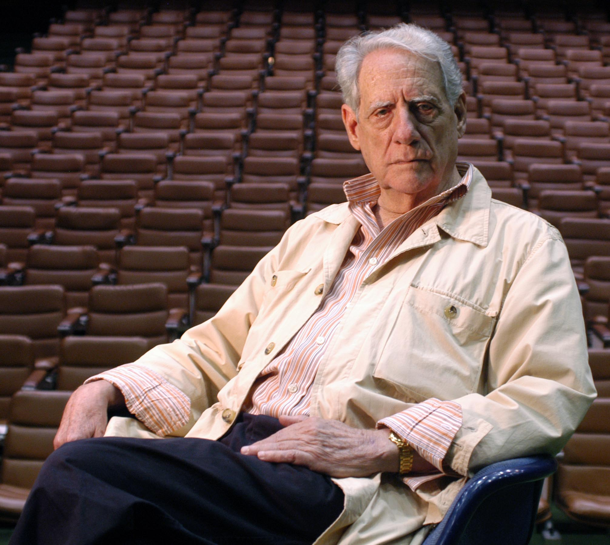 Rafael Calventi en el auditorio del Banco Central de la República Dominicana.